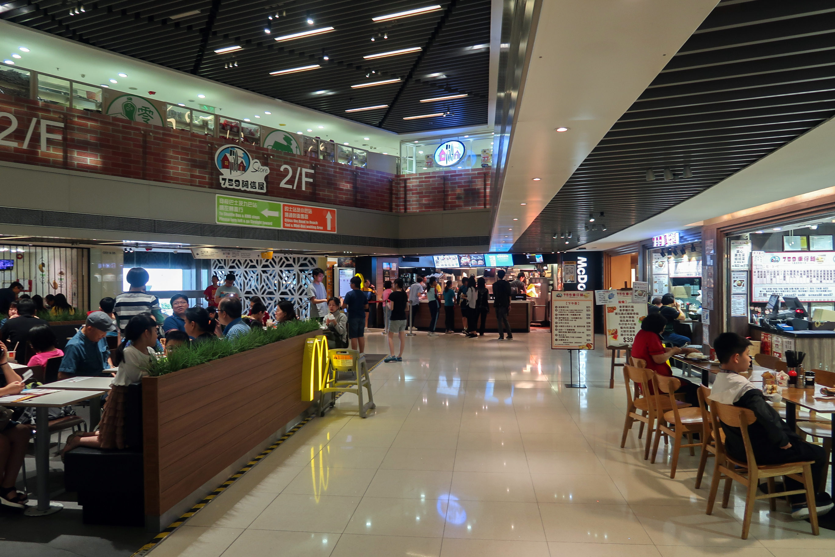 EMax G/F Restaurants